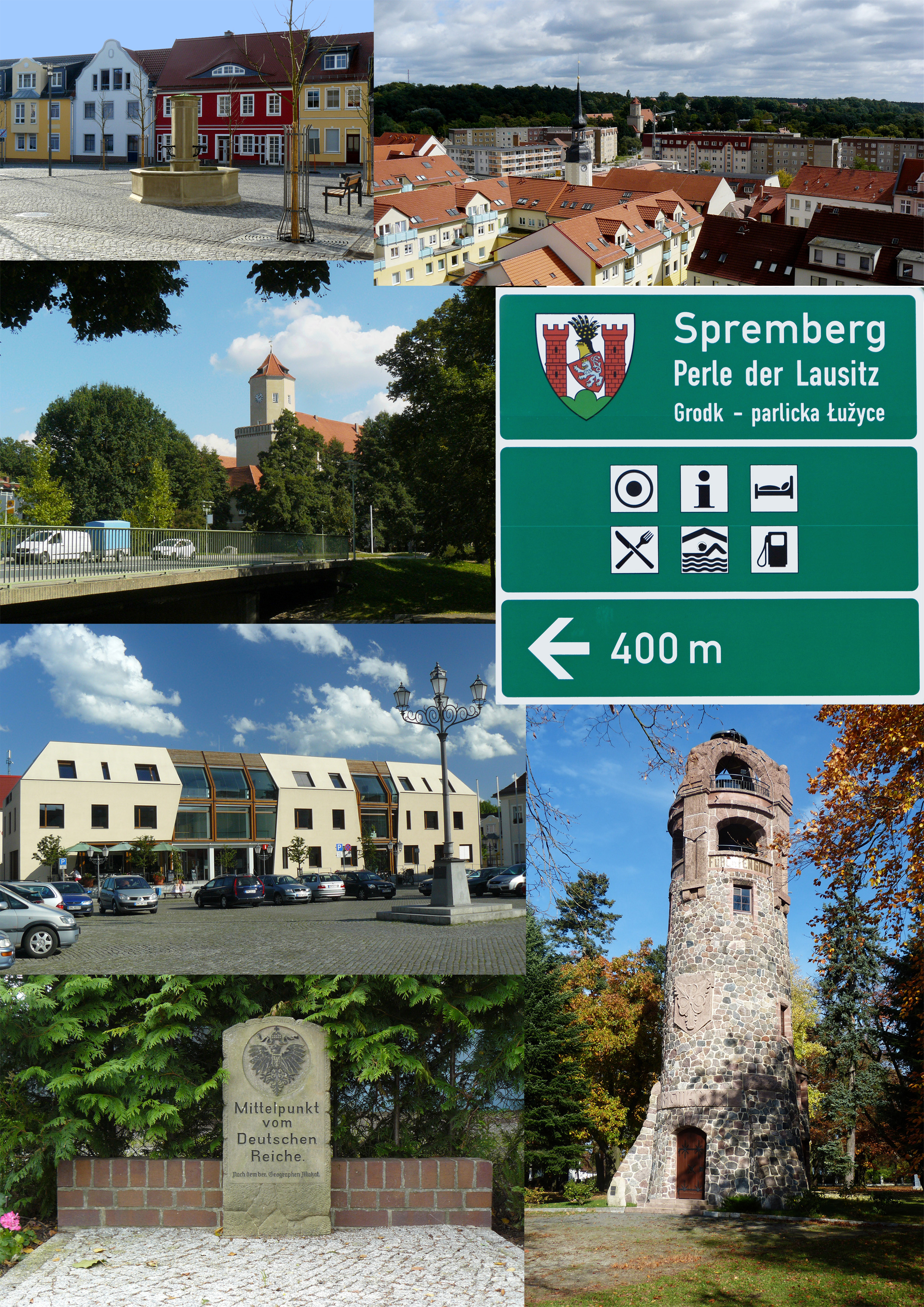 Bilder der Stadt Spremberg Kleiner Markt mit Saebisch Brunnen (Oben Links) Dächerblick in Richtung Schloss Spremberg (Oben Rechts) Schloss Spremberg (Mitte Oben) Bürgerhaus Spremberg (Mitte Unten) Gedenkstein "Mittelpunkt des Deutschen Reiches" in den Grenzen 1871-1920 (Unten Links) Bismarckturm Spremberg (Unten Rechts) Hinweisschild "Spremberg - Perle der Lausitz"